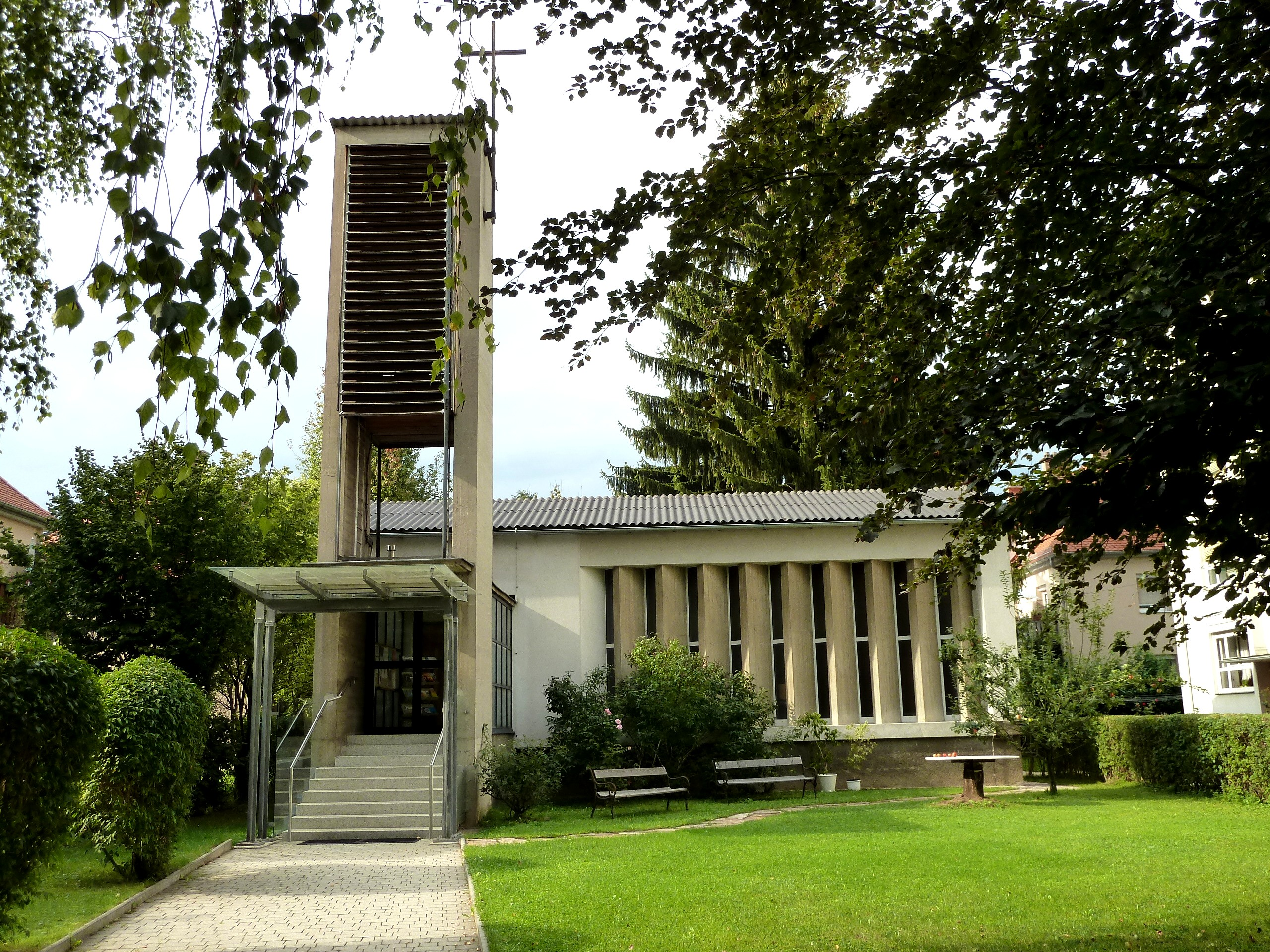 Evang. Filialkirche